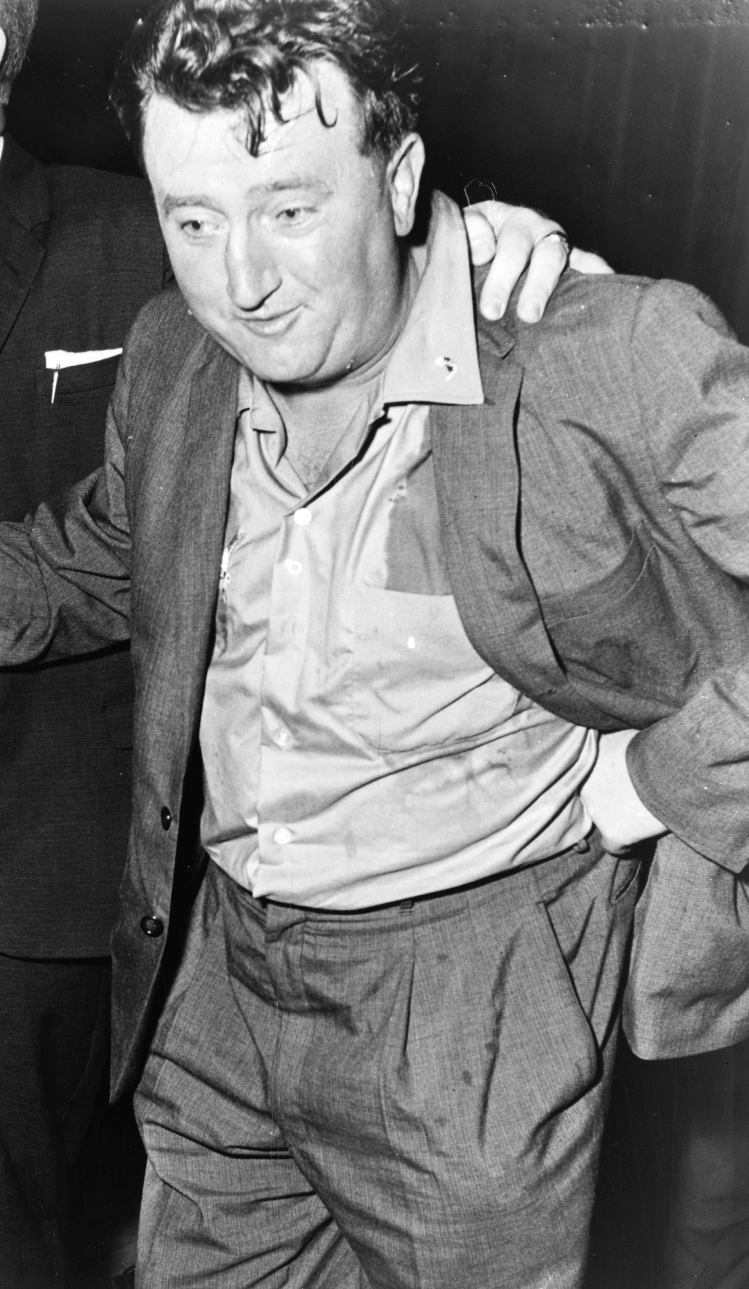 De Brendan Behan 1960.